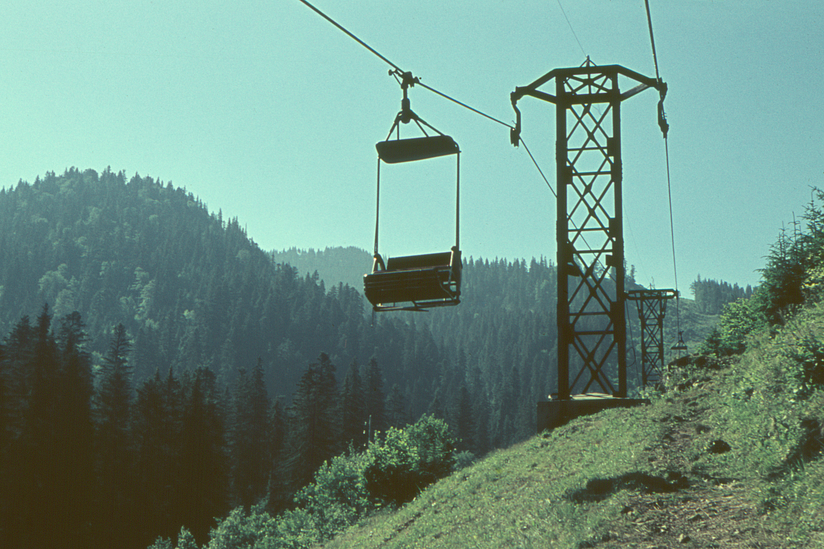 Sesselbahn mit Doppelsitz zum Postăvarul (Berg Schuler) in Siebenbürgen, Rumänien im Jahr 1964